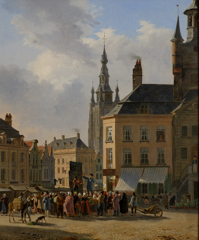 Marktdag in Kortrijk. Gezicht op een stadsplein in Kortrijk. Een groep toehoorders heeft zich verzameld rond een podium waarop een man viool speelt terwijl een straatzanger met een stok naar een roldoek met afbeeldingen wijst. Rechts een man met een kruiwagen, links laadt een man manden op een ezel. Aan het plein een café met terras.